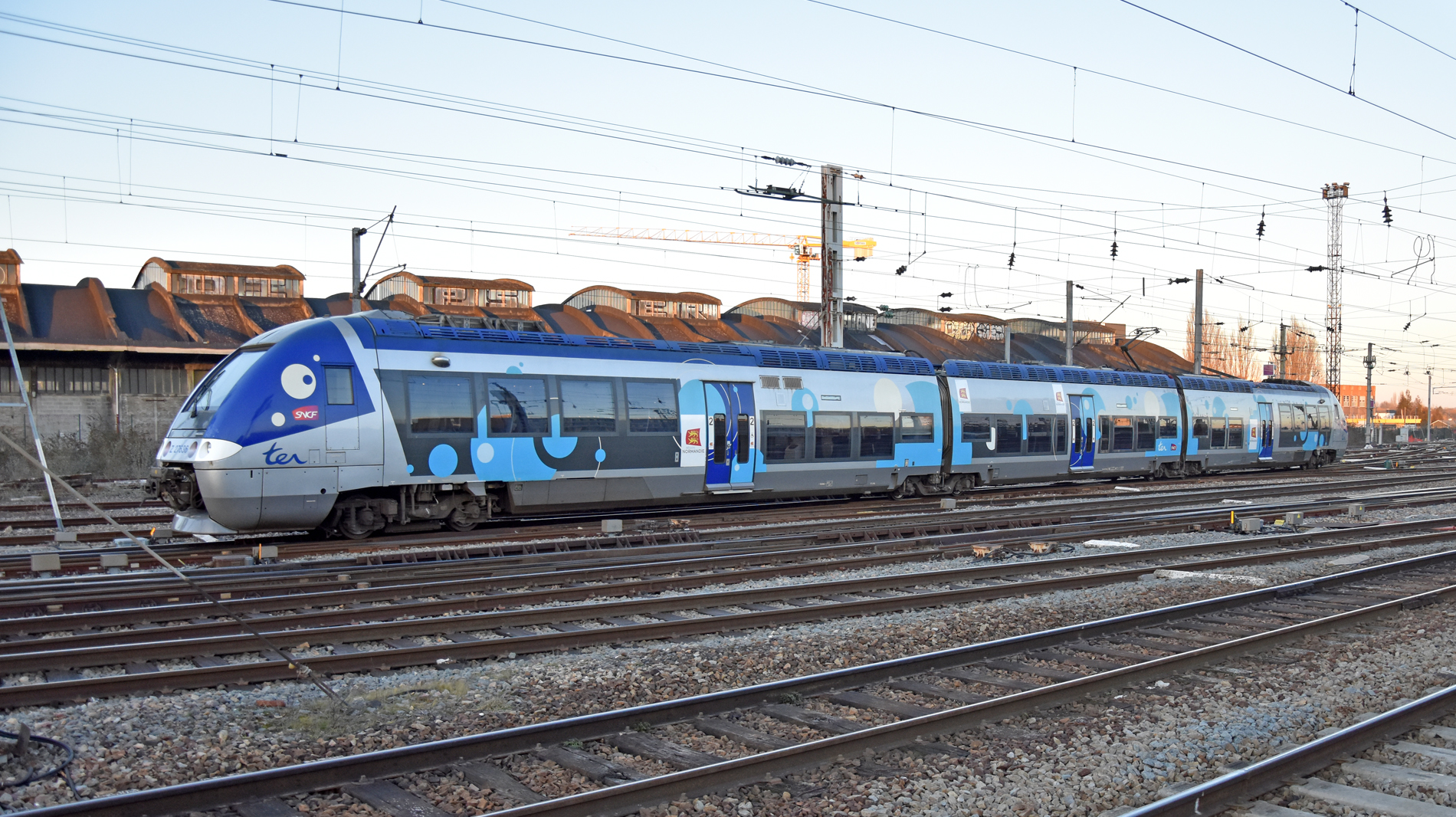 Z 27635/36 à Amiens